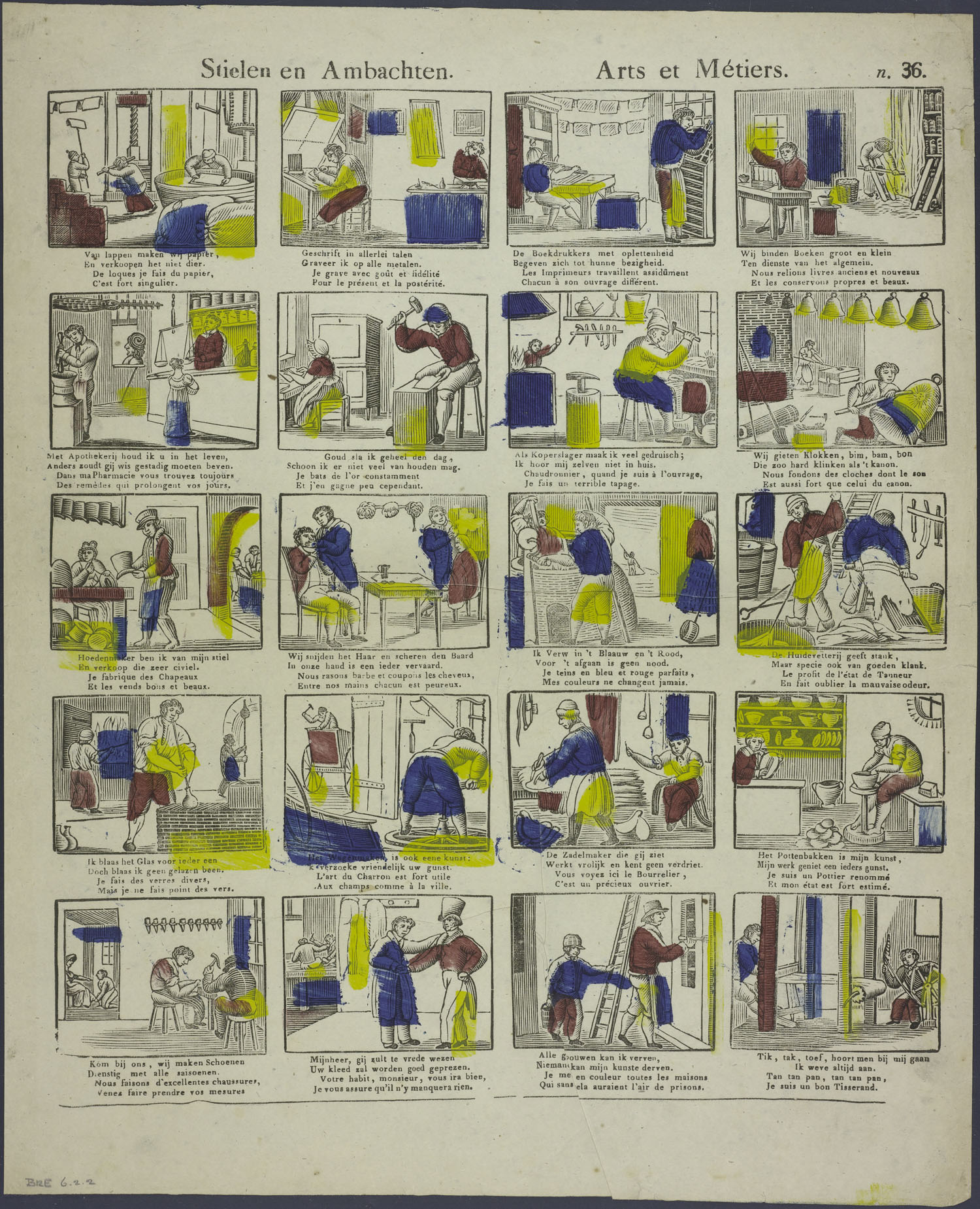 Centsprent met 5 x 4 omkaderde houtsneden, met afbeeldingen van beroepen van mannen: papiermaker, graveur, boekdrukker, boekbinder, apotheker, goudsmid, koperslager, klokkengieter, hoedenmaker, kapper, verver, leerlooier, glasblazer, wagenmaker, zadelmaker, pottenbakker, schoenmaker, kleermaker, schilder en wever. Bevat tweeregelige rijmende onderschriften in Nederlands en Frans.